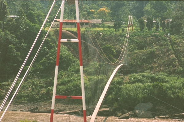 Il ponte sul Rio Aguarico, Sucumbíos, Ecuador